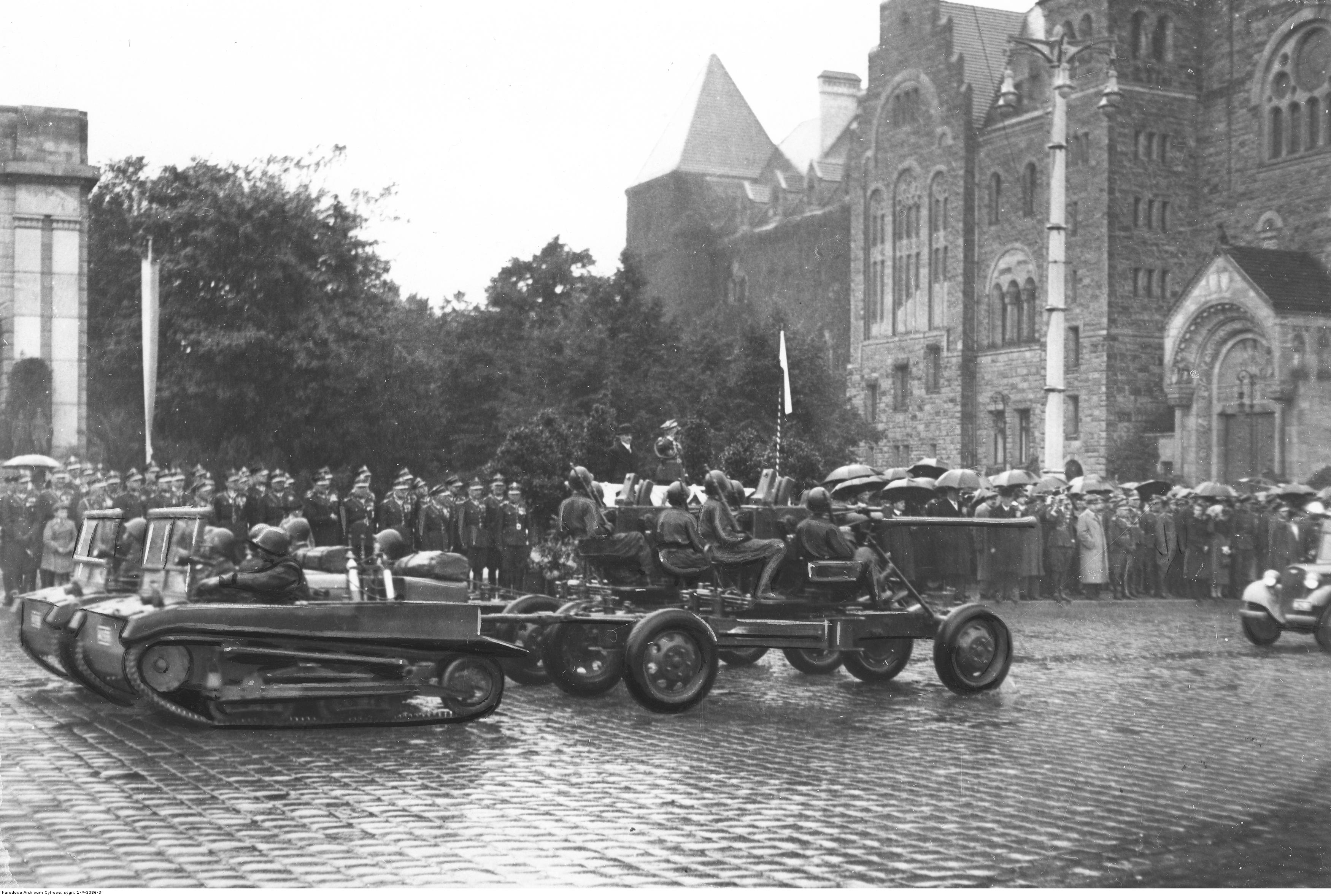 Uroczystości w Poznaniu z okazji rocznicy Bitwy Warszawskiej 1920 roku zwanej "Cudem nad Wisłą" i Święta Żołnierza w 1939 r. Oddziały artylerii przeciwlotniczej podczas defilady przed Zamkiem Cesarskim - widoczne 40 mm armaty przeciwlotnicze Bofors wz. 36 holowane przez ciągniki C2P. Koncern Ilustrowany Kurier Codzienny - Archiwum Ilustracji. Sygnatura: 1-P-3386-3